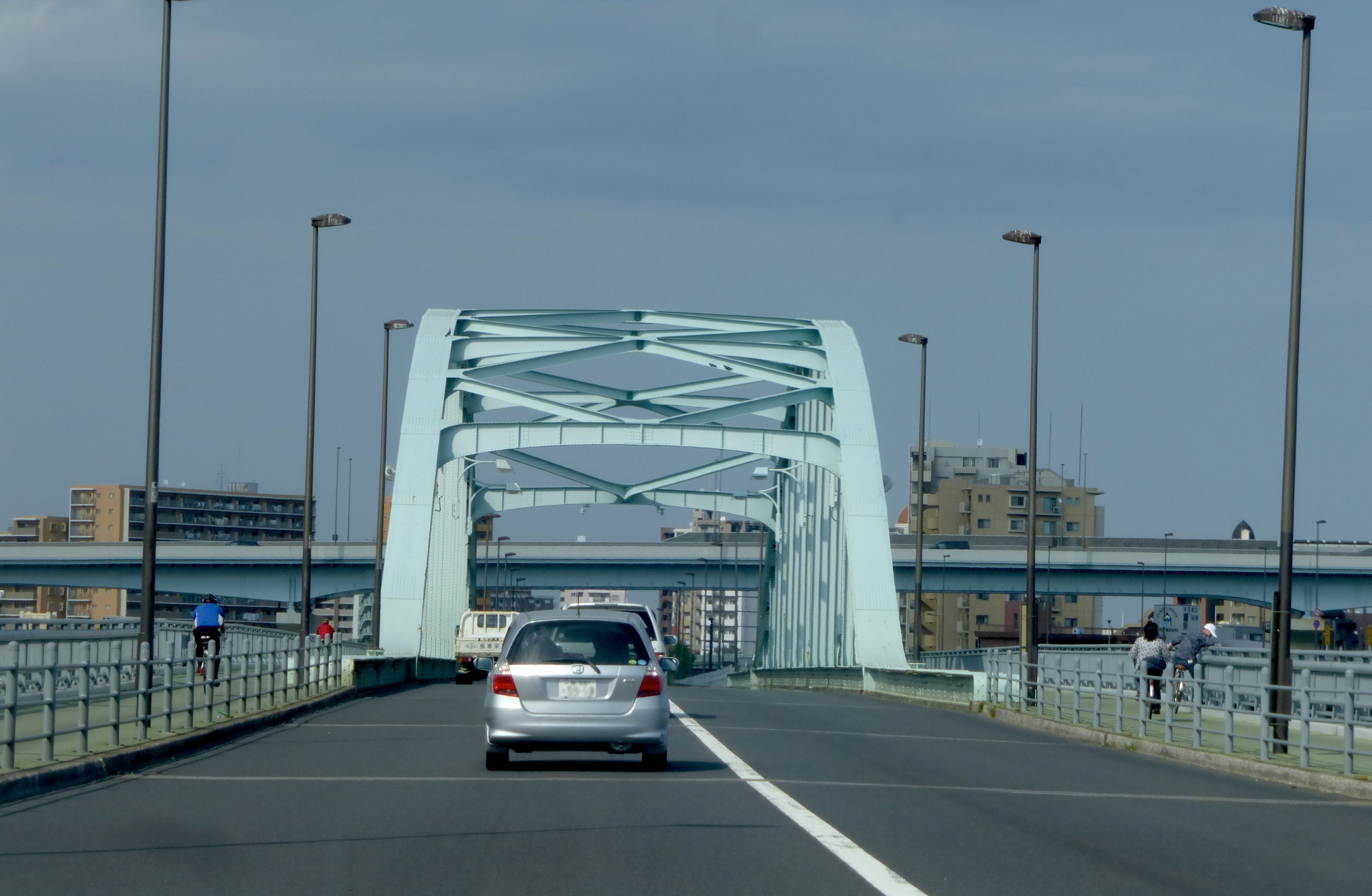 四ツ木橋（よつぎばし）は荒川に架かる道路橋の一つ。(Yotsugi Bridge goes over Arakawa river)